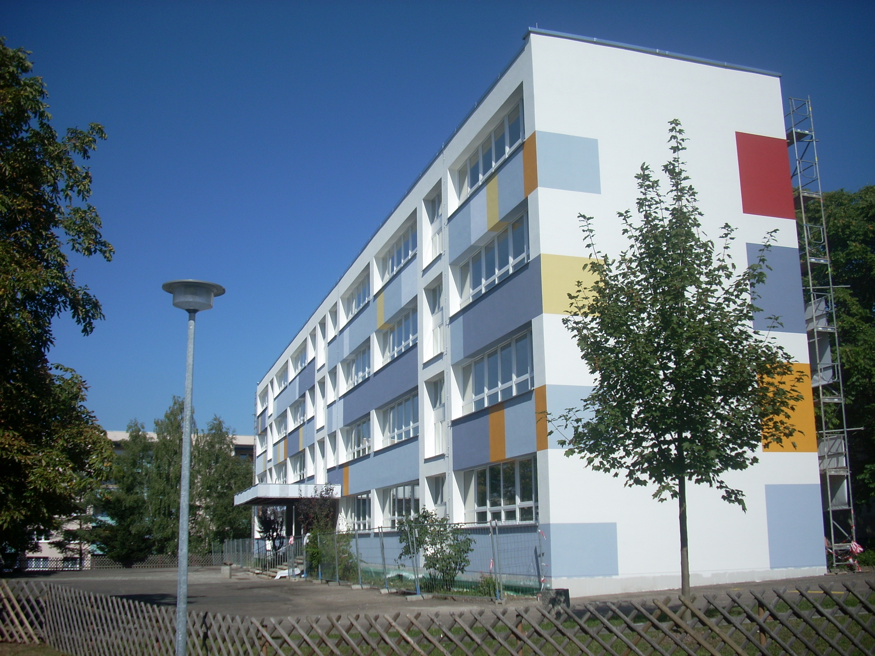 Vorderseite des Erasmus - Reinhold - Gymnasium